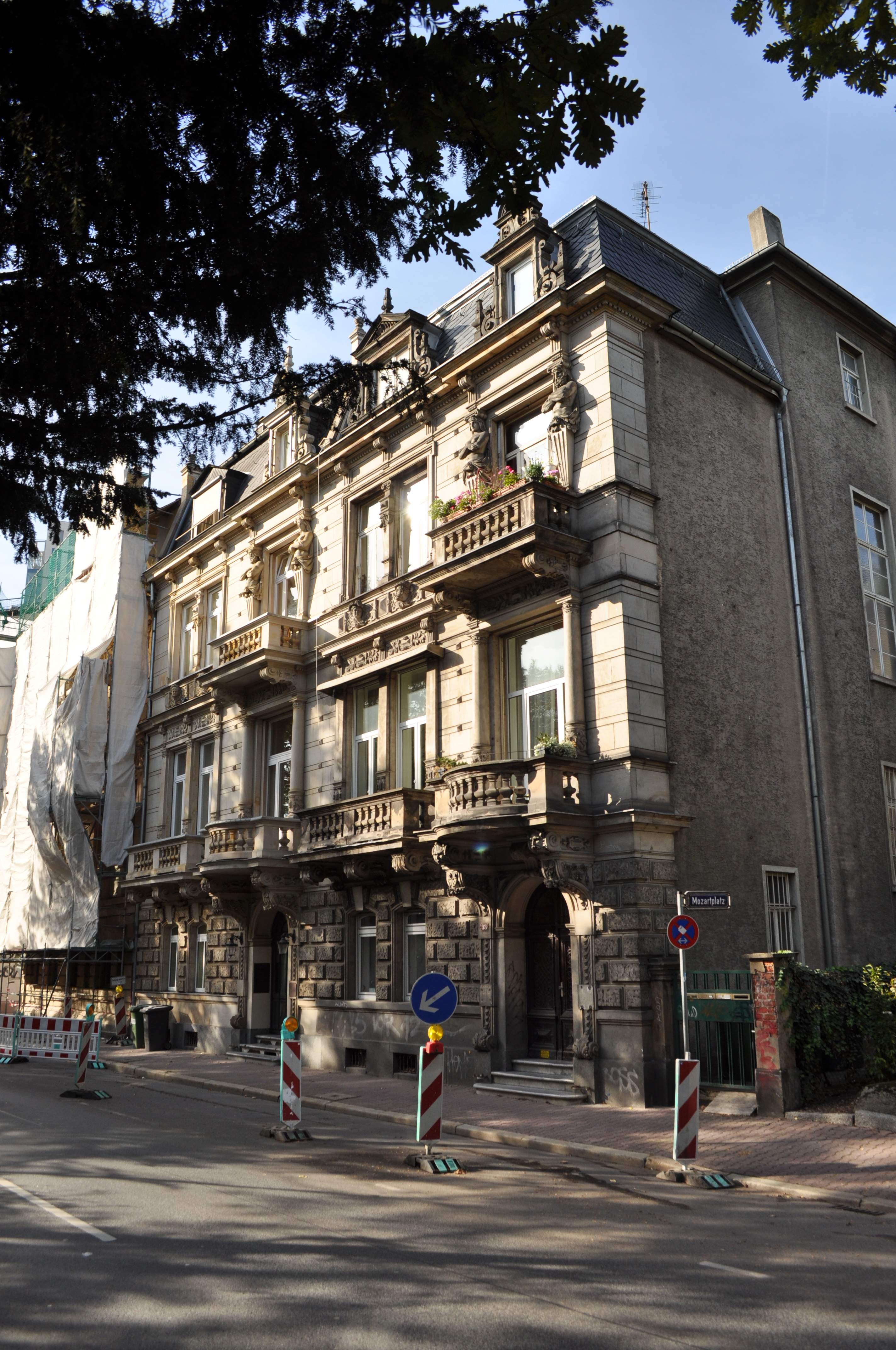 Denkmalgeschütztes Gebäude Bockenheimer Anlage 33 in Frankfurt. Doppelwohnhaus im Stil der Neurenaissance nach Entwurf von Anton Eysen mit reich gegliederter Sandsteinfassade. Gliederungselemente sind Balustraden, Pilaster- und Halbsäulenstellung sowie Hermenpilaster.